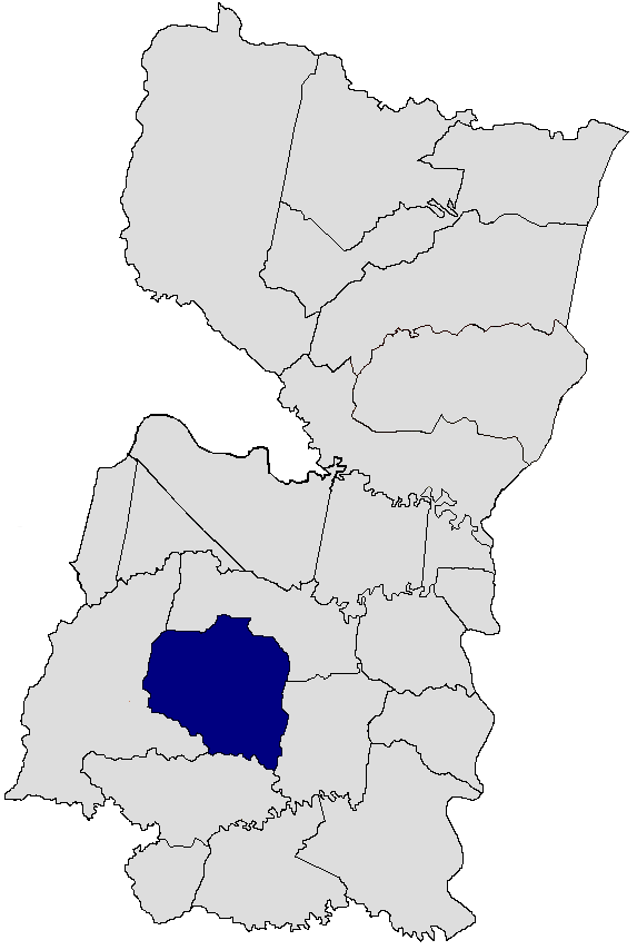 Santa Rita